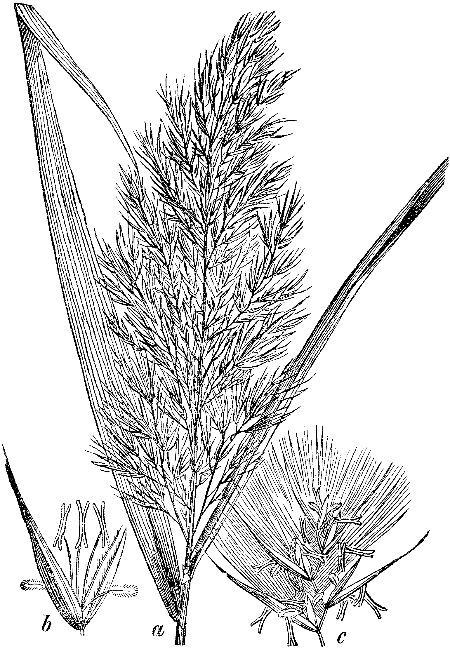 Slika 462. Trstika. (Phragmítes commúnis.) [sic!]